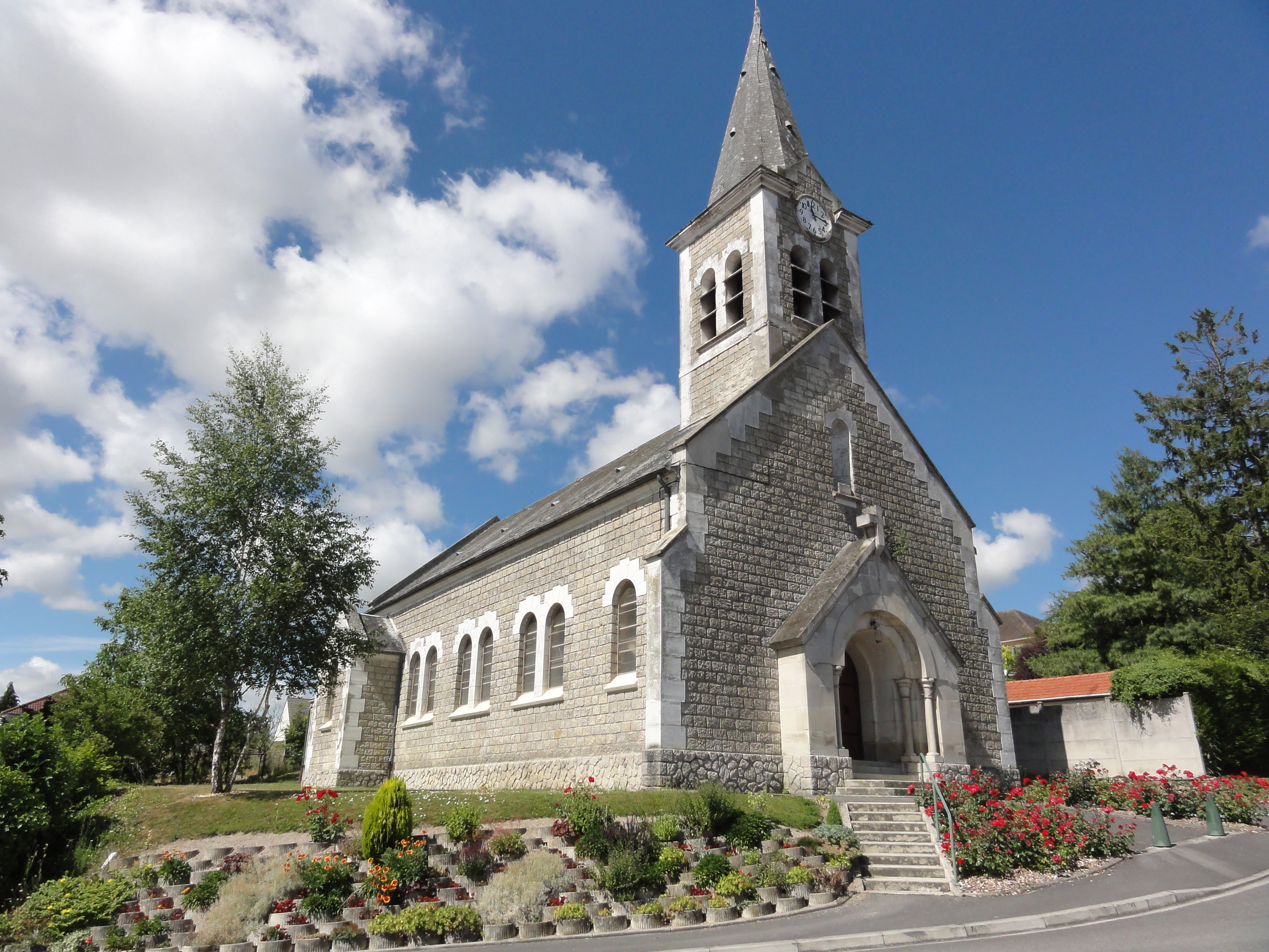 Évergnicourt (Aisne) église Saint-Pierre